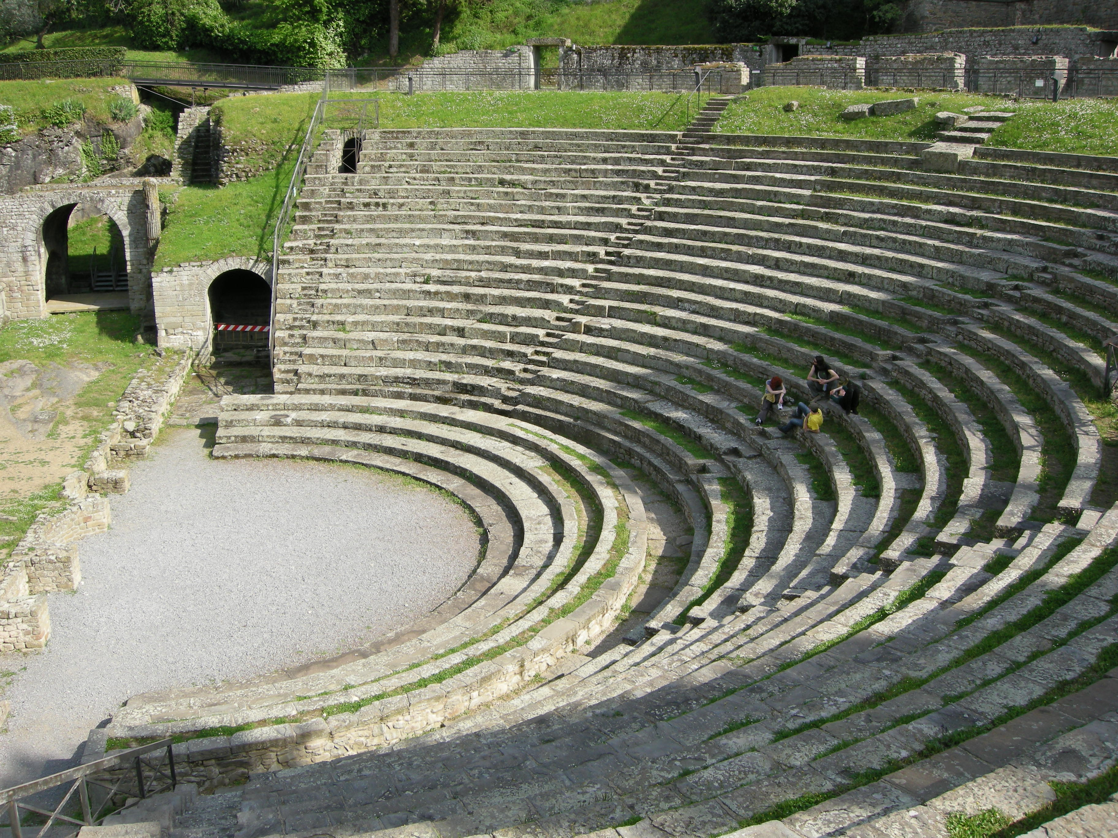 Fiesole, area archeologica, teatro